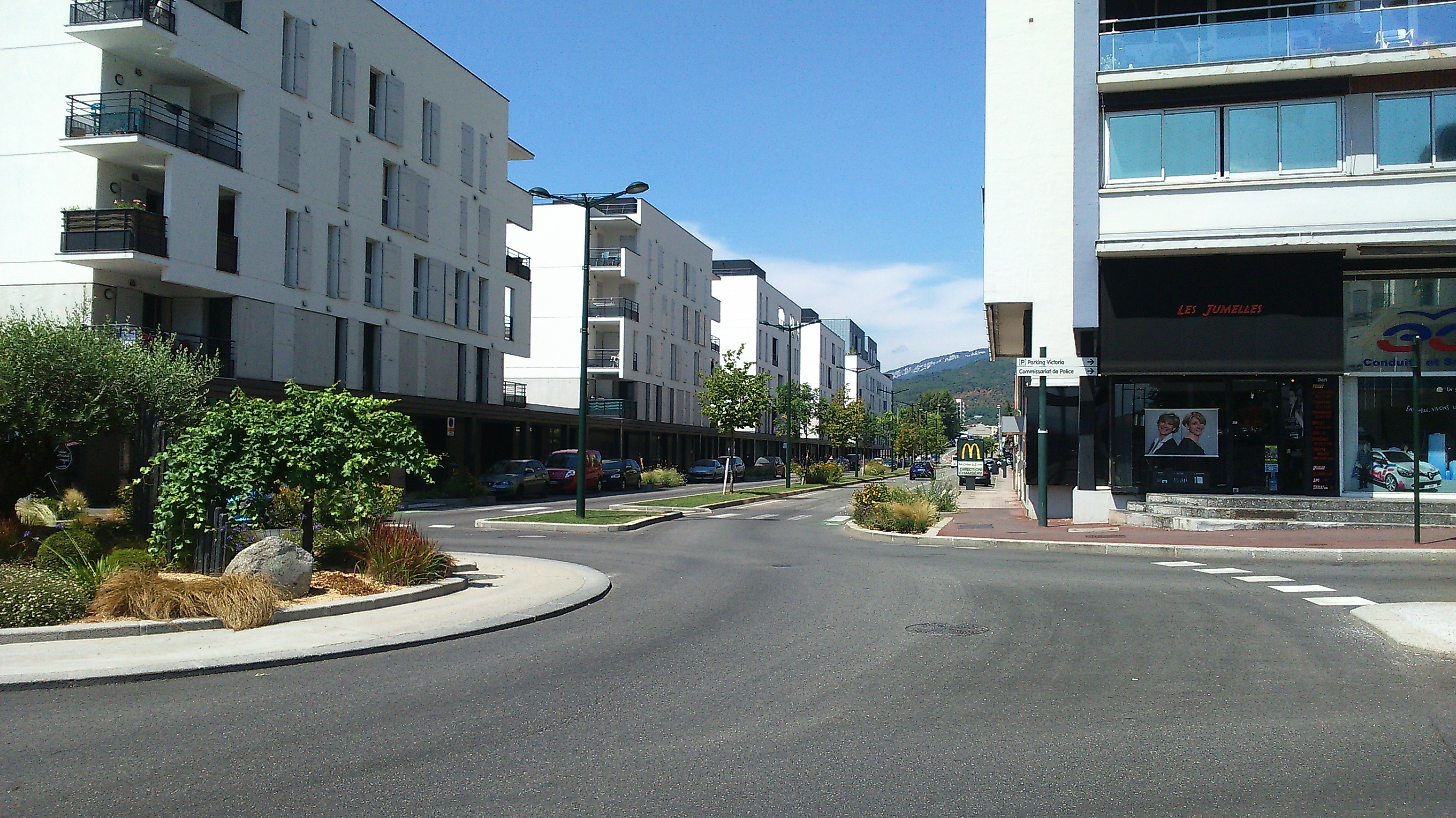 Route départementale traversant Aix-les-Bains du sud vers le nord.